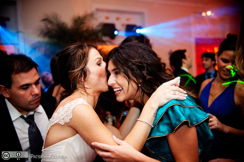 A atriz Fernanda Paes Leme.